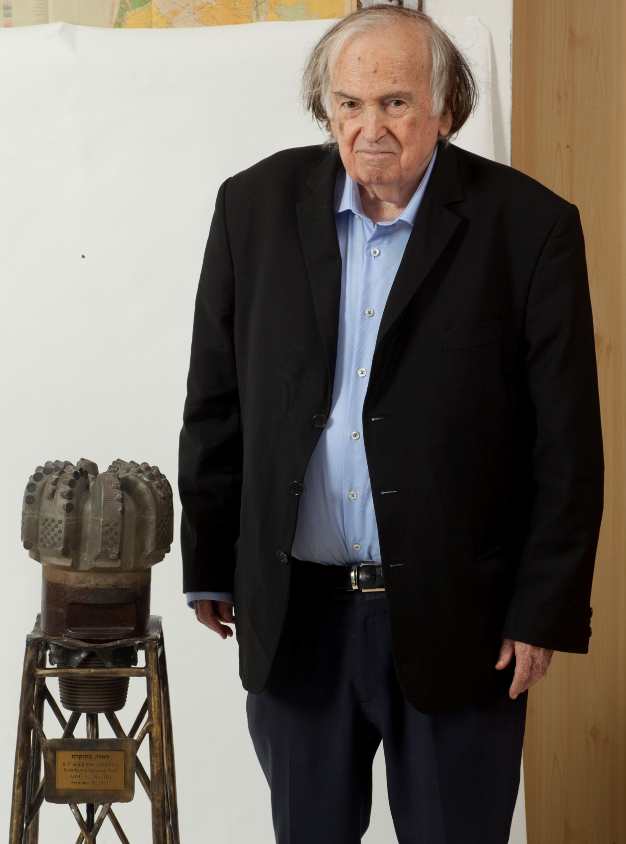 ד"ר רוזנברג ליד ראש המקדח של קידוח הגז בשדה "לווייתן 4", שהוענק לו כהוקרה ע"י הַחברות השוּתָפוֹת בשדה לווייתן (דלק, אבנר ונובל אנרג'י).